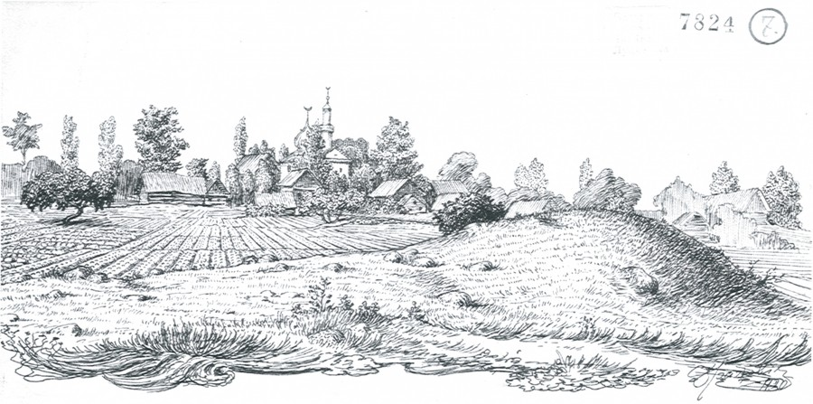 Беларуская (тарашкевіца): Менск (Miensk), Татарская Слабада (Tatarskaja Słabada)